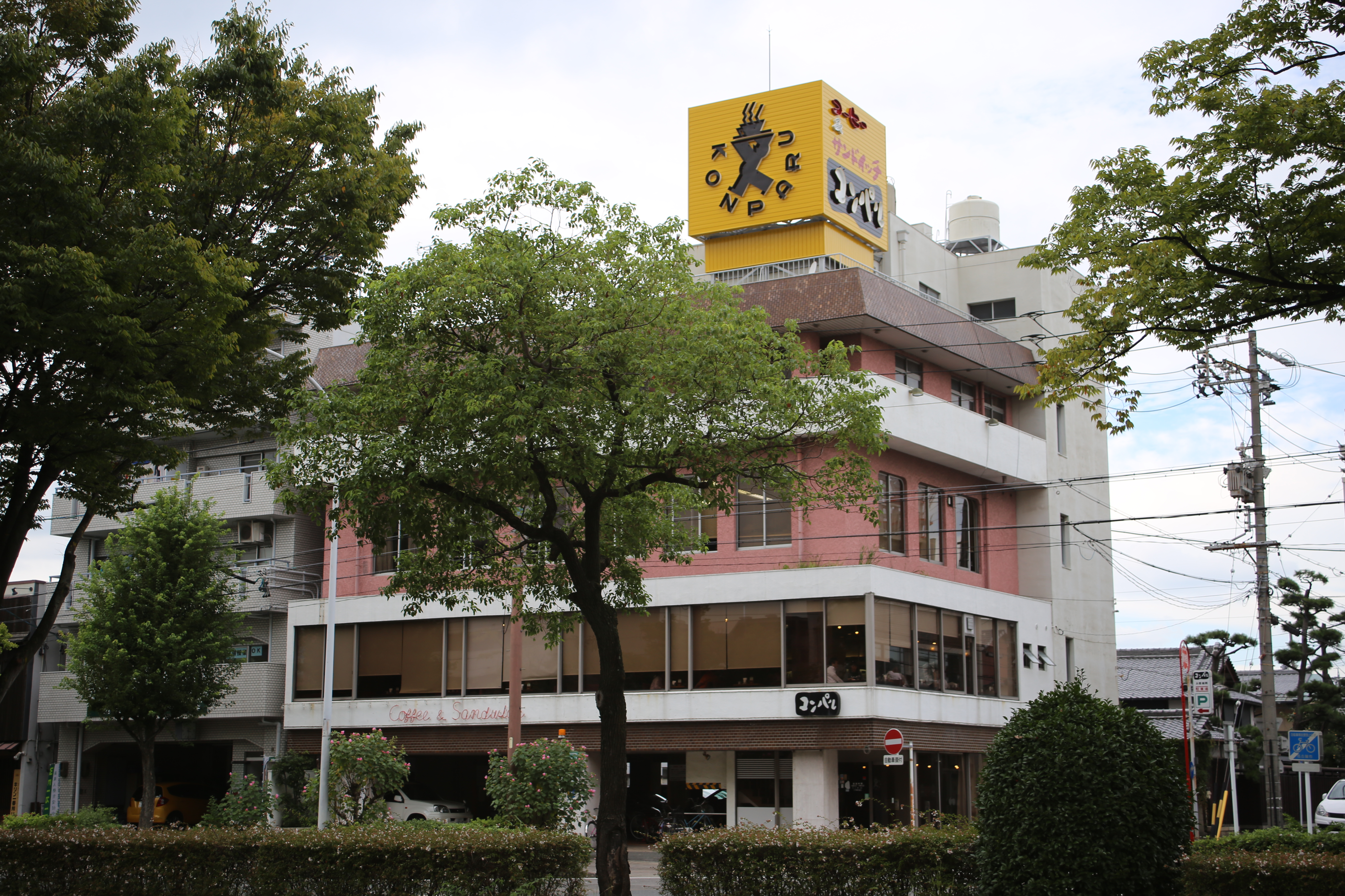 名古屋市昭和区御器所通二丁目の喫茶店コンパル御器所店を南側公道東側より撮影